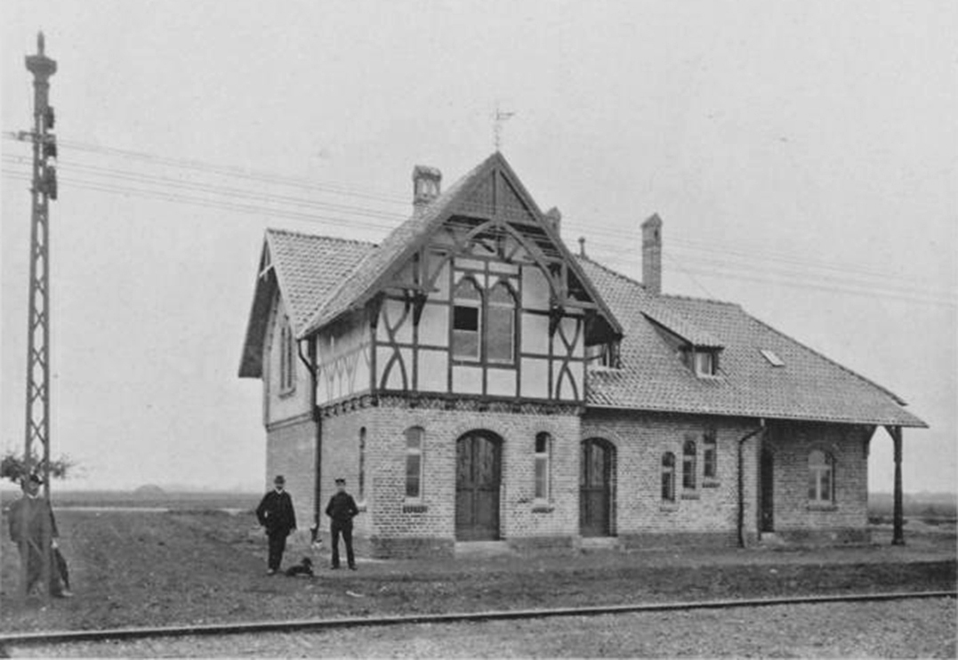 Wärterwohnung für 2 Familien auf Forsthaus Meer der Kleinbahn Düsseldorf-Krefeld, 1898 (Tafel 29), heute Rheinbahnstation Forsthaus (bis 1990 „Haus Meer“)